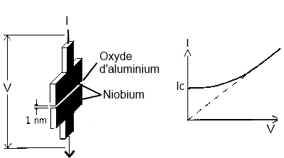 La jonction de Josephson consiste à un supraconducteur comme du niobium séparé par un fin film isolant. La courbe du voltage en fonction du courant met en évidence le courant supraconducteur Ic au travers de la jonction, même avec une tension nulle.